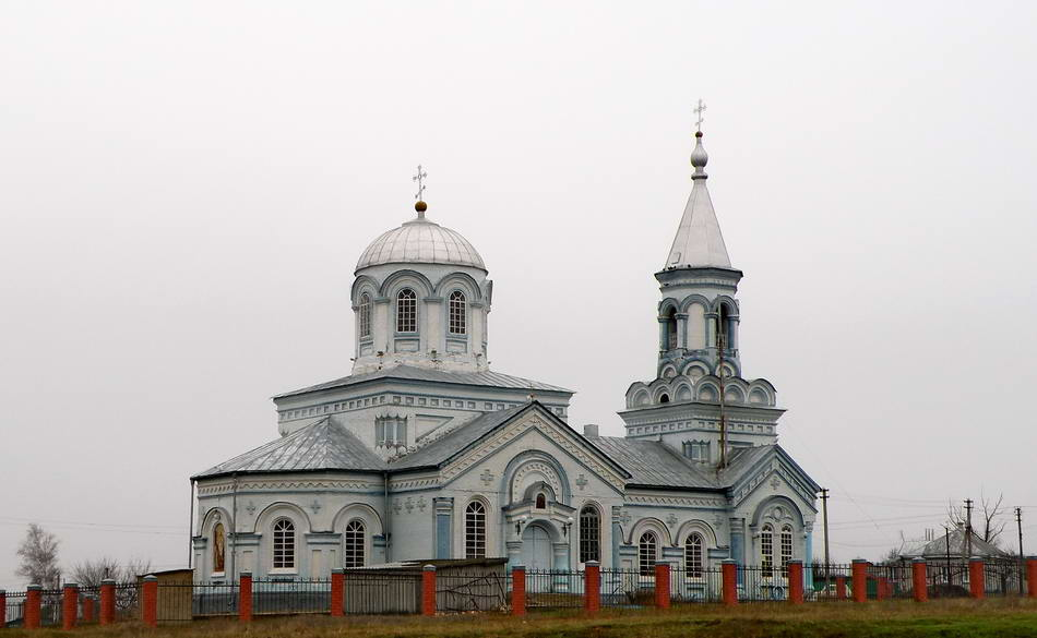 Белгородское Белогорье 2010. Церковь в Стрелецком (Алексеевка — Бирюч).